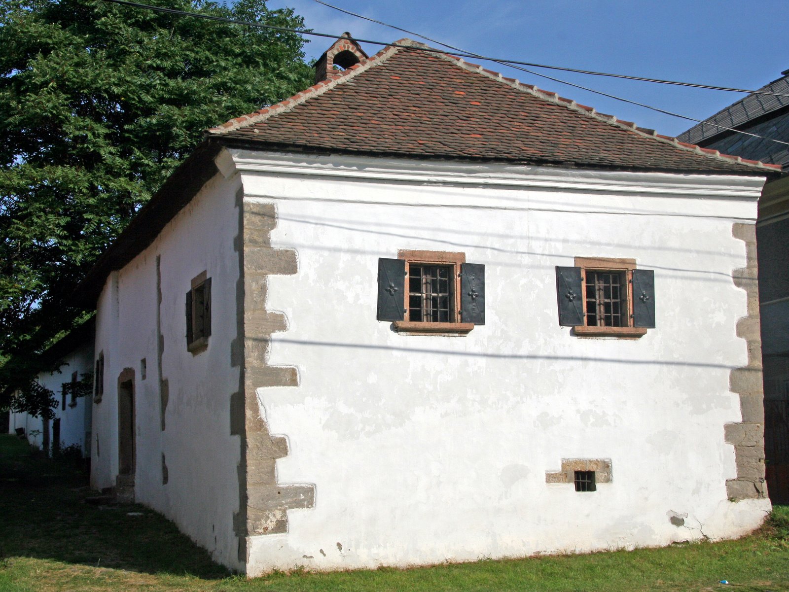 Huszita ház (Gönc, Kossuth Lajos u. 102.) This is a photo of a monument in Hungary, Identifier: 2789